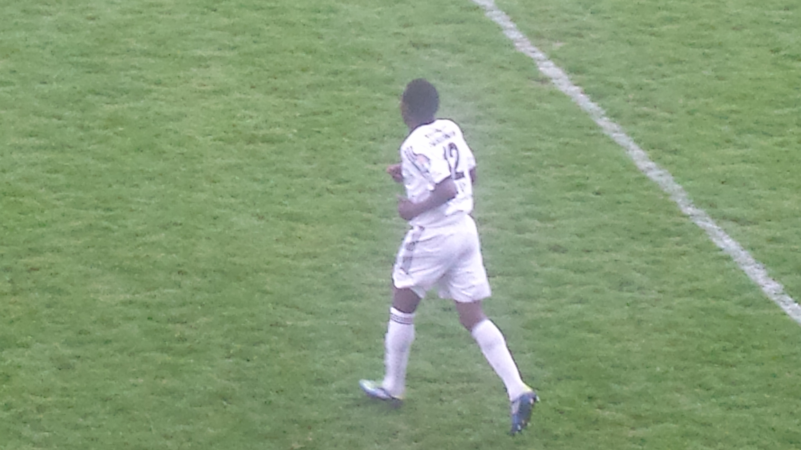 Oscar Olou lors du match Arras / Romorantin, le 25 avril 2015, au Stade Degouve-Brabant d'Arras, comptant pour la vingt-sixième journée du championnat de France amateur de football ou CFA (quatrième division française).